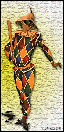 Harlekin mit Maske